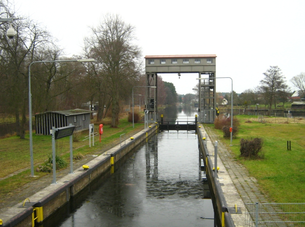 Schleuse in Bredereiche (Landkreis Oberhavel, Brandenburg)